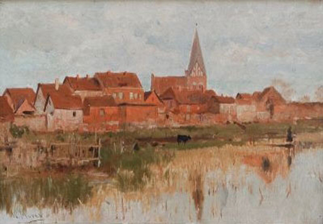 Röbel/Müritz mit Mönchteich und Nikolaikirche